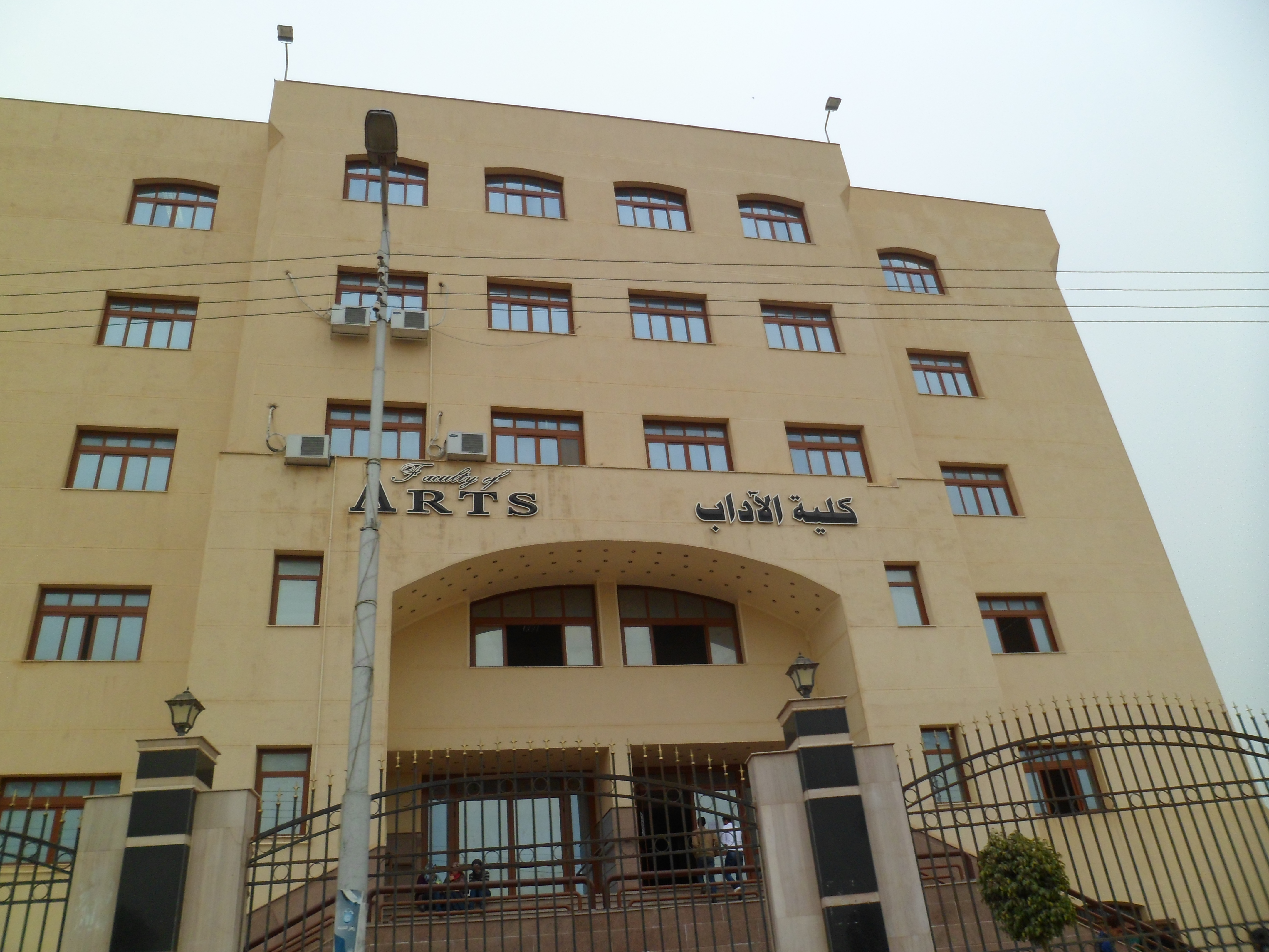 كلية الآداب، جامعة كفر الشيخ، مدينة كفر الشيخ، مصر.